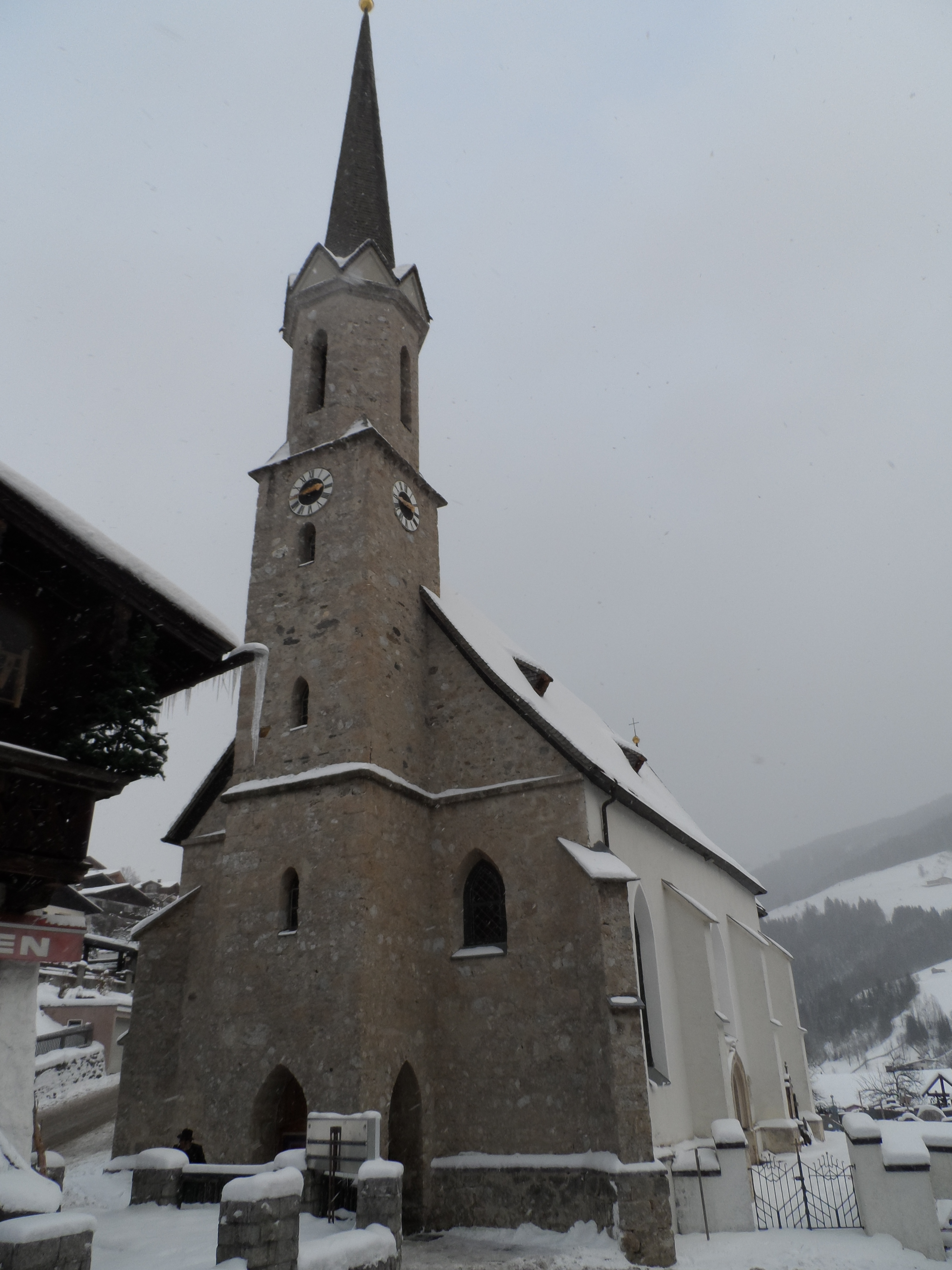 Pfarrkirche St. Sebastian - Mühlbach am Hochkönig